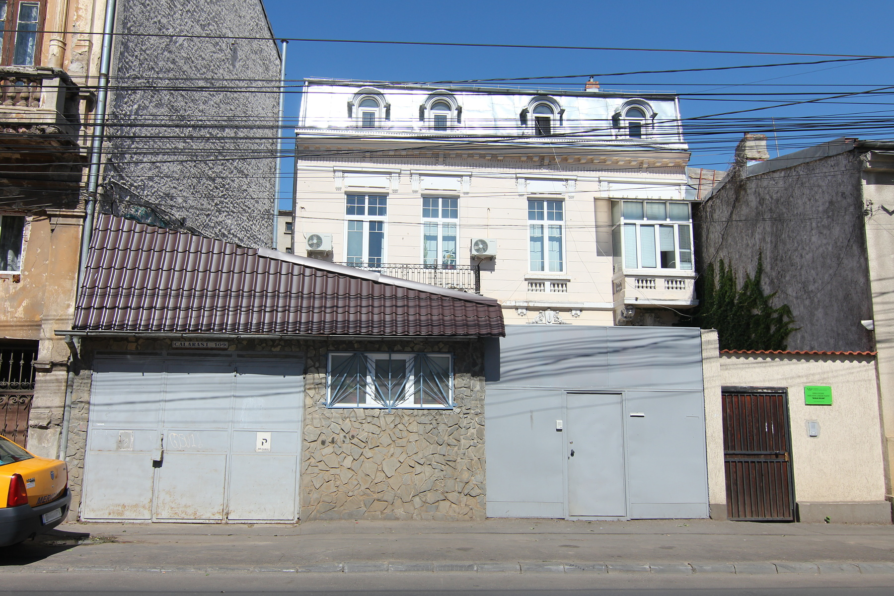 Casă pe Calea Călărașilor